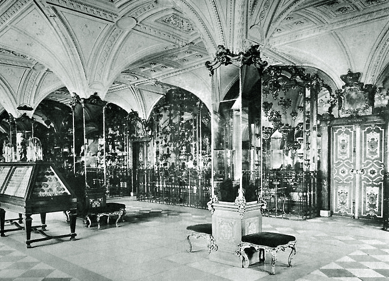 Pretiosensaal, Grünes Gewölbe, 1904